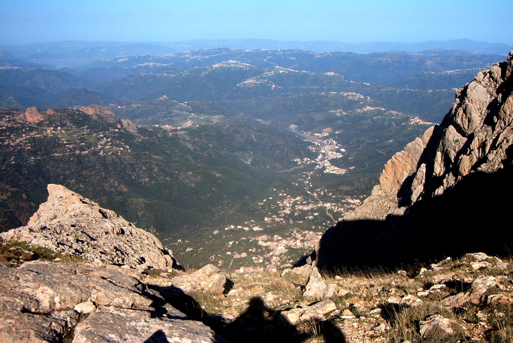 Vue de la Grande Kabylie depuis les cimes du Djurdjura (Algérie).